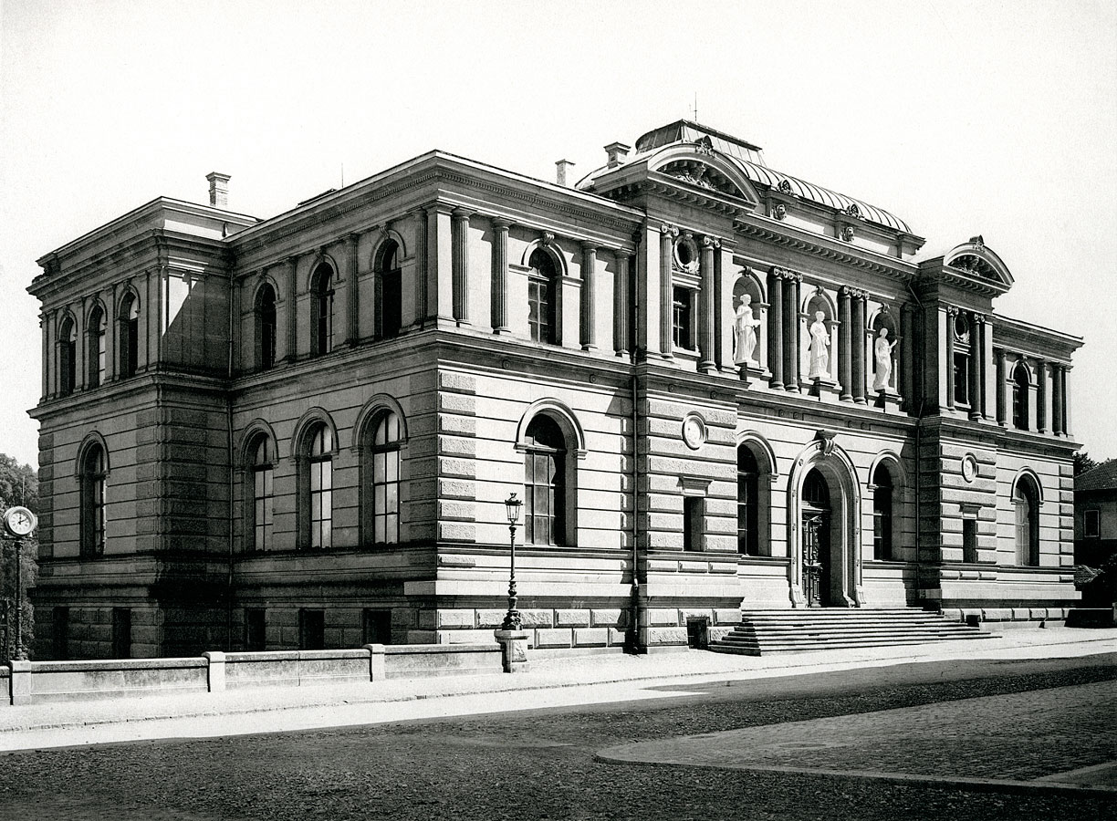 Kunstmuseum Bern. Erbaut 1876—1878 von Eugen Stettler.